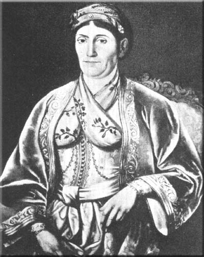 Љубица Обреновић (1785-1843), жена кнеза Милоша Обреновића